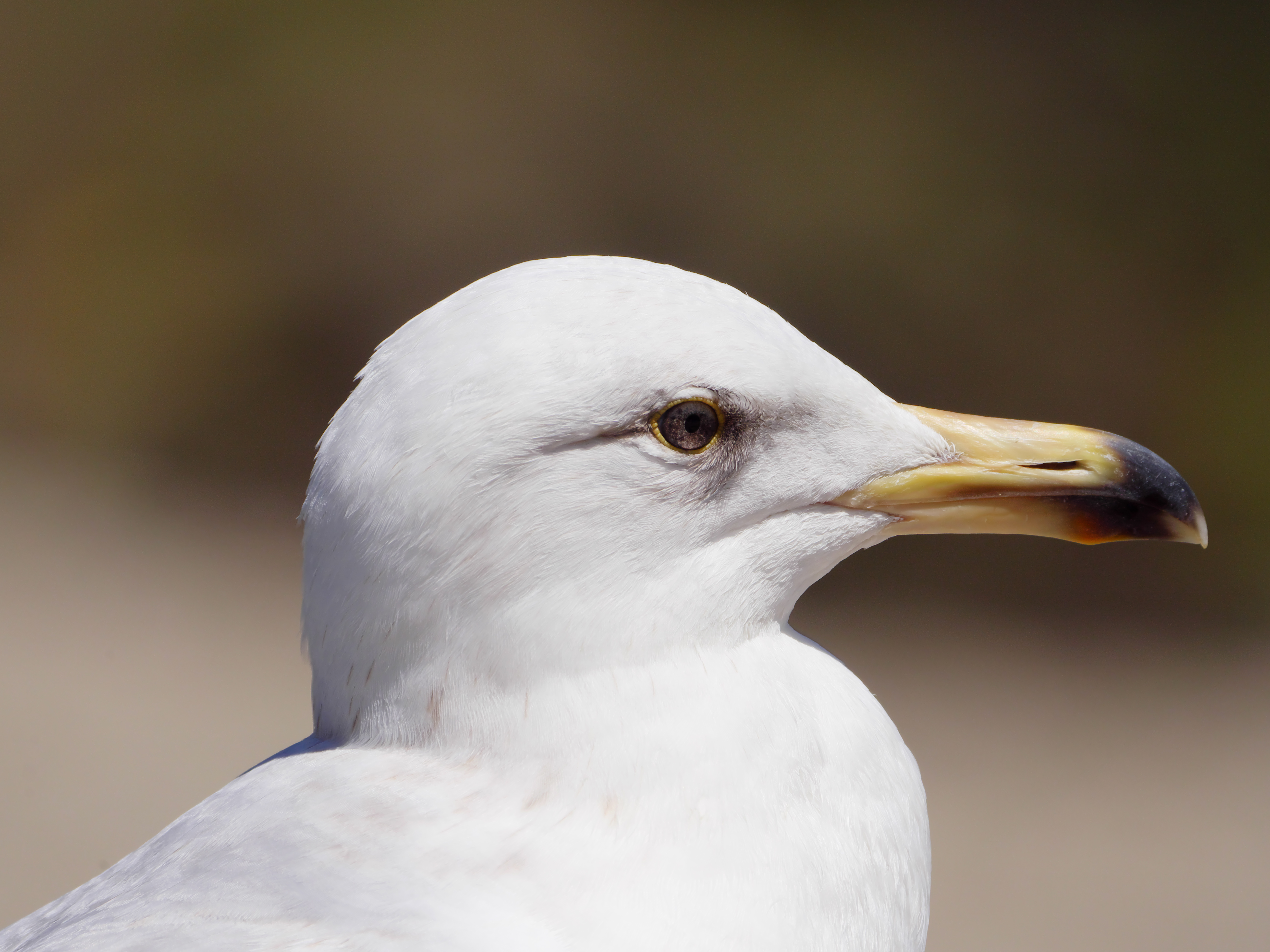 Kopf einer etwa zweijährigen Mittelmeermoewe an der Bretonischen Küste